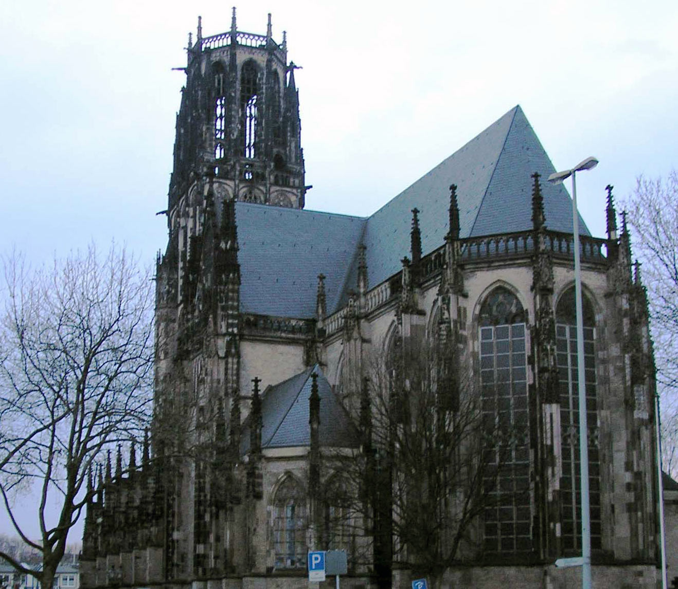 Salvatorkirche Duisburg